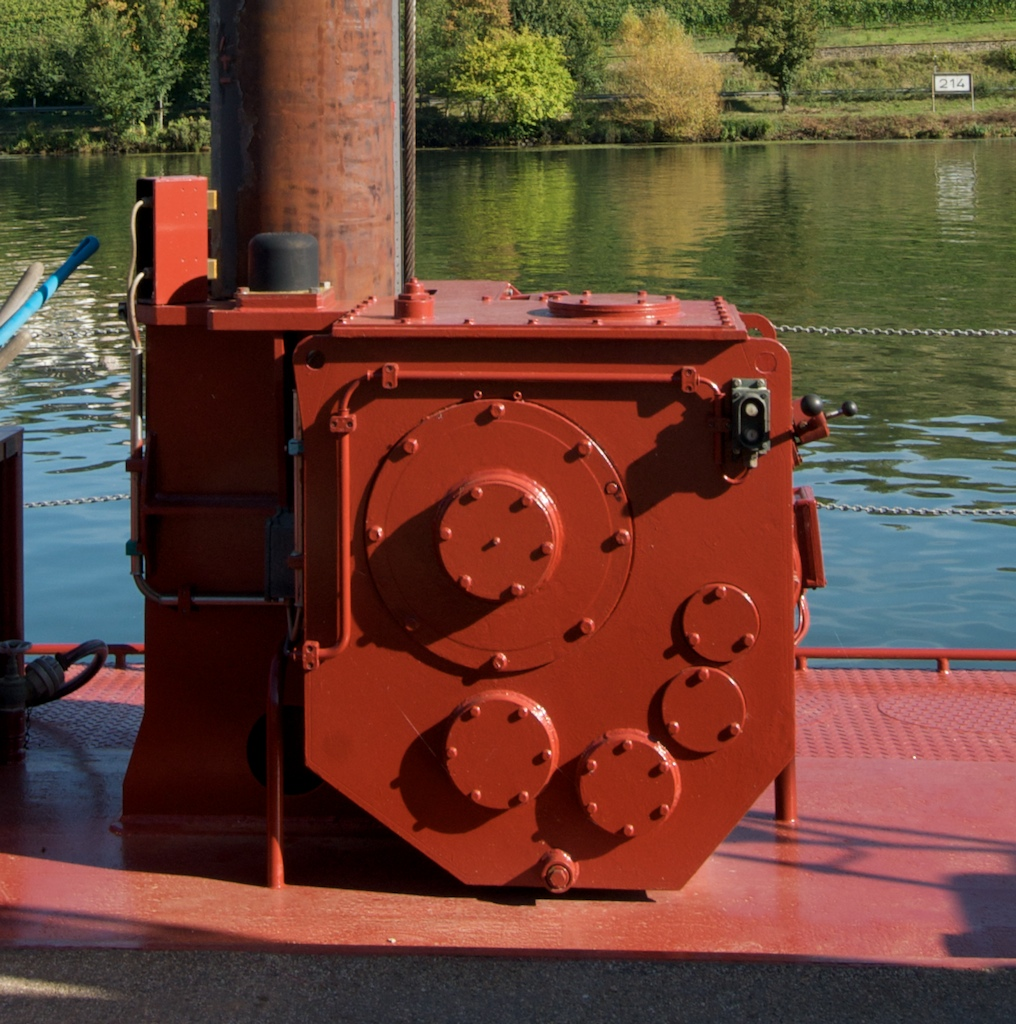 Sujet: Duebelseelwann fir e Stempelanker